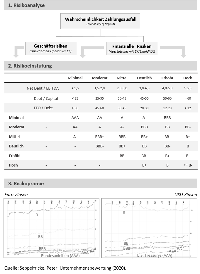 Die Abbildung wurde selbständig mit Powerpoint angefertigt. Ein Urheberkonflikt besteht nicht.